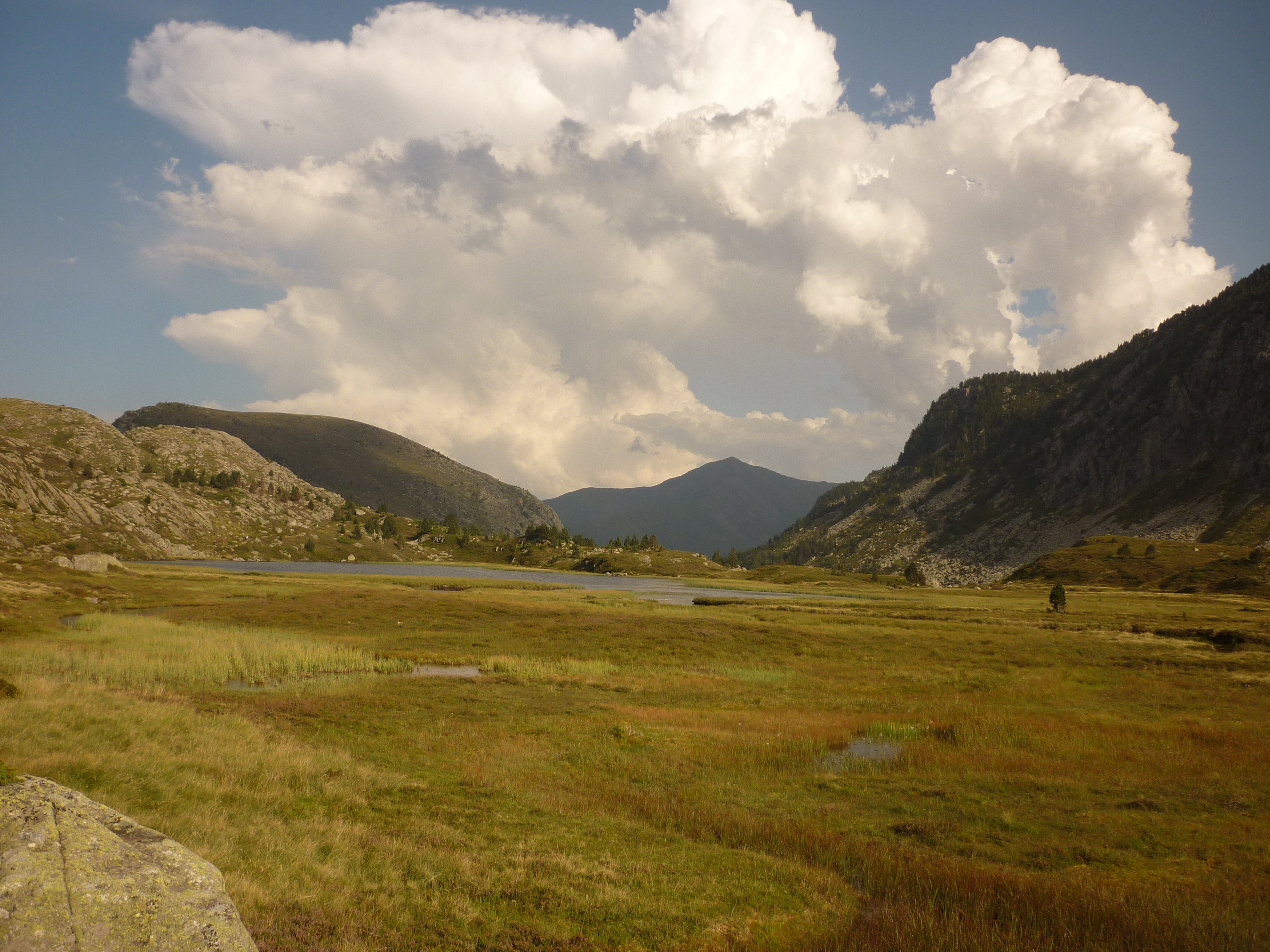 zone humide de la montagne de Pyrénées, paysage d' Ariège